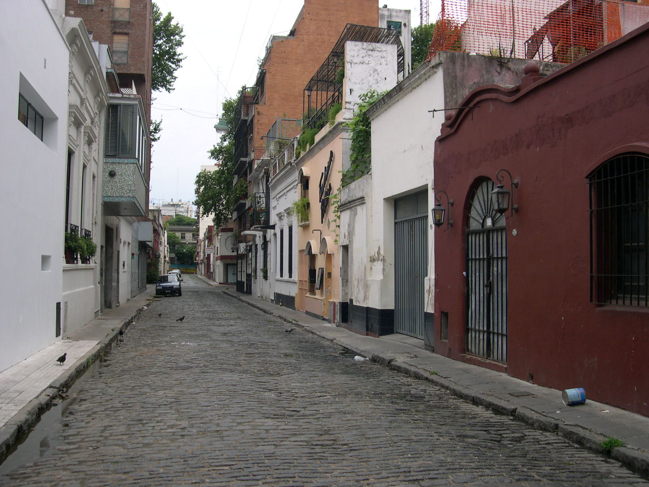 Pasaje Bollini. Palermo, Buenos Aires, Argentina